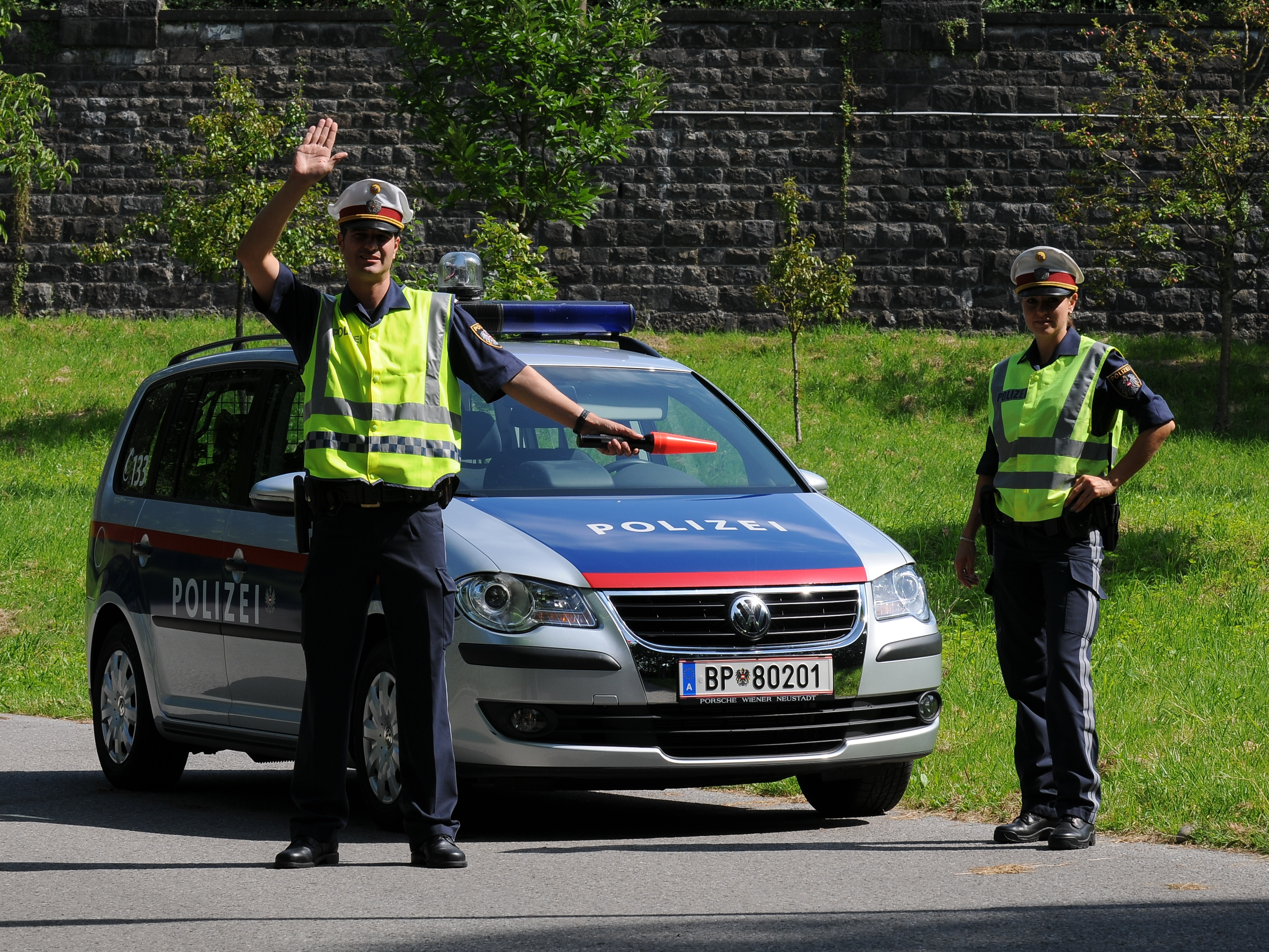 Beamter der österreichischen Bundespolizei mit Warnweste und Anhaltestab in klassischer Anhalteposition für eine Fahrzeugkontrolle.